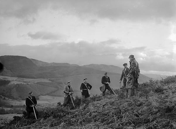 Teitl Cymraeg/Welsh title: Coed y Brenin Ffotograffydd/Photographer: Geoff Charles (1909-2002) Nodyn/Note: Tree planting. Dyddiad/Date: 1/1/953 Cyfrwng/Medium: Negydd ffilm / Film negative Cyfeiriad/Reference: (gch04060) Rhif cofnod / Record no.: 3368972 Rhagor o wybodaeth am gasgliad Geoff Charles yn Llyfrgell Genedlaethol Cymru More information about the Geoff Charles Collection at the National Library of Wales Mae ffotograffau Geoff Charles hefyd yn rhan o Broject Europeana Libraries Geoff Charles' photographs also form part of the Europeana Libraries Project